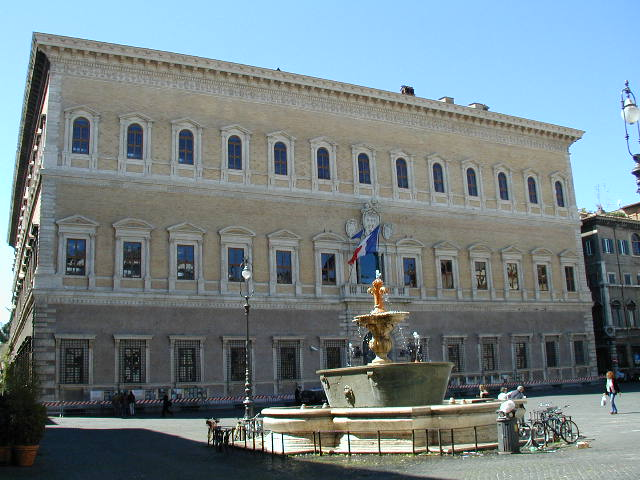 Palazzo Farnese a Roma.